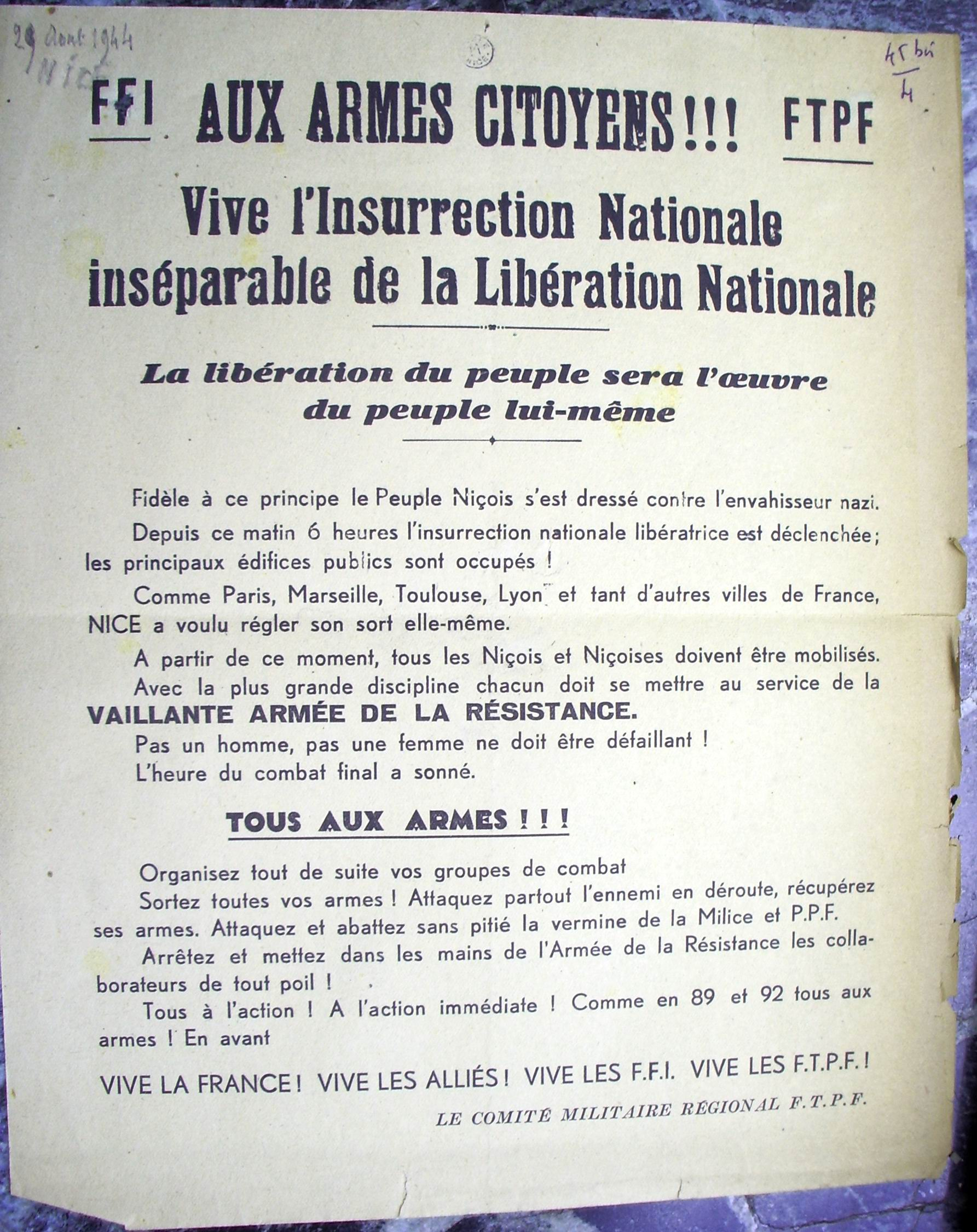 Affiche collée sur les murs dela ville de Nice la nuit du 27 mai 1944.